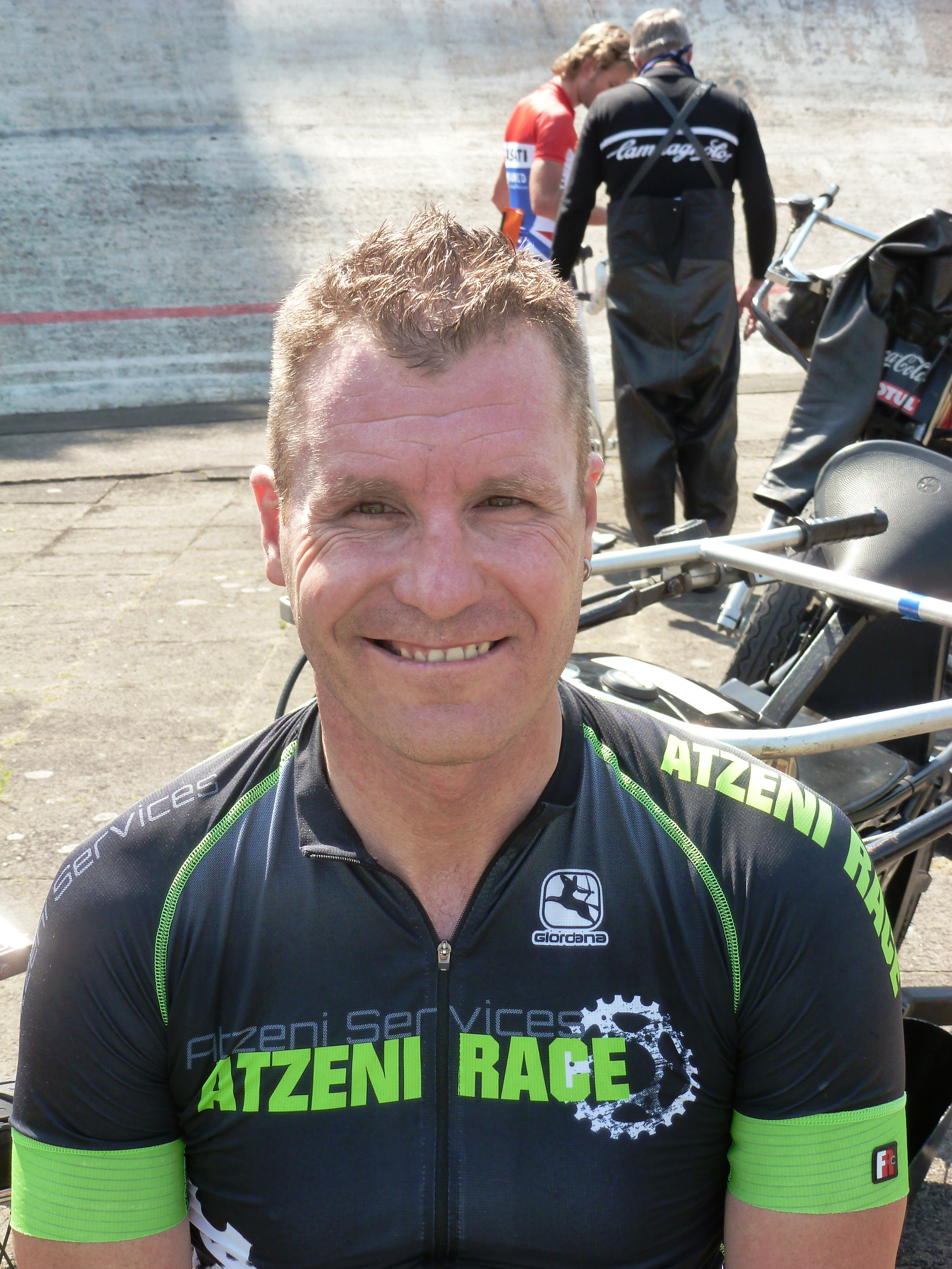 Peter Jörg, Schweizer Radrennfahrer